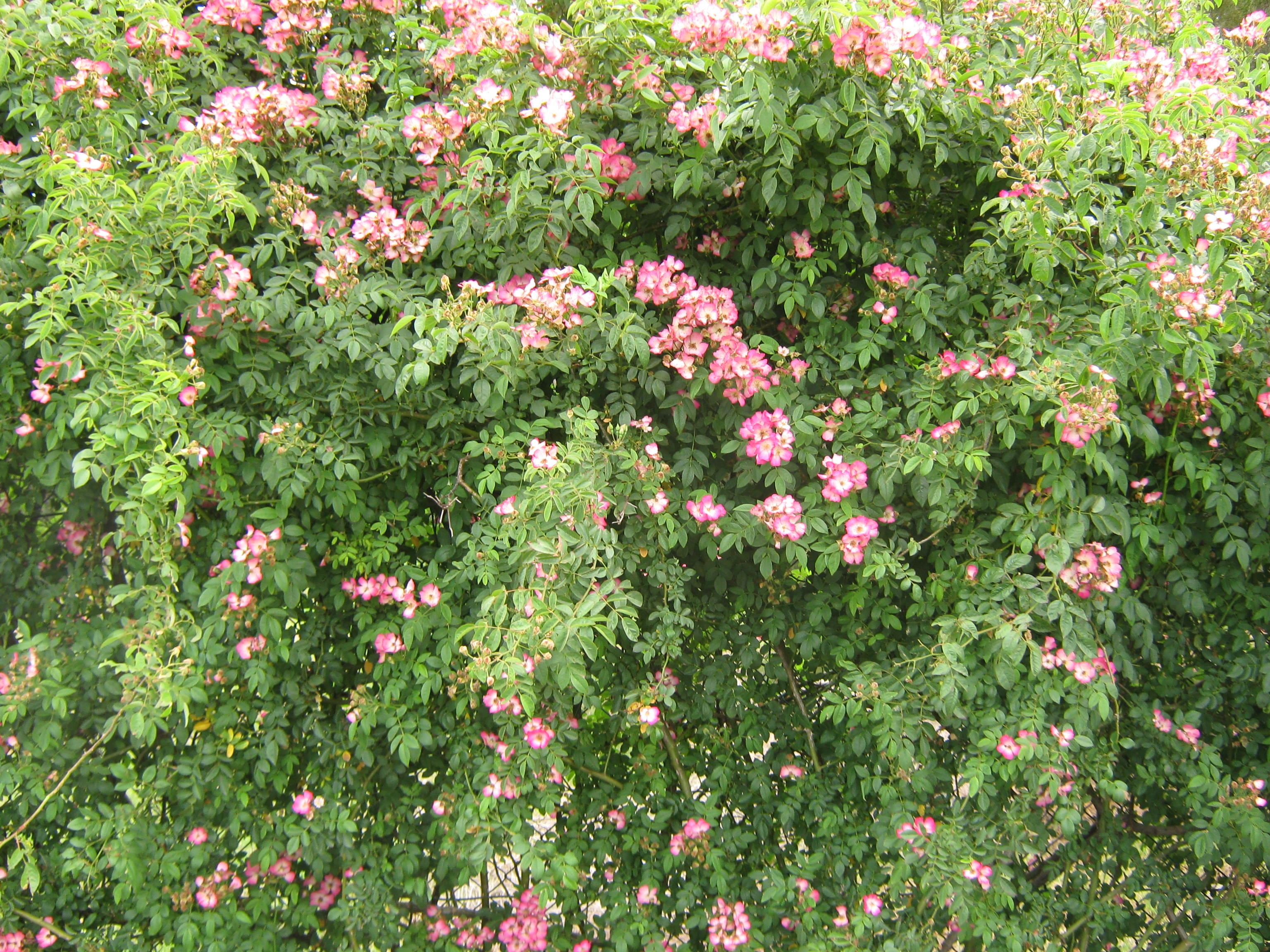 Alister Clark Multiflora rambler 'Gladsome" 1937